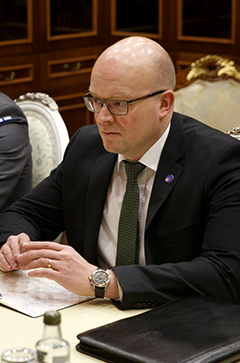 Чрезвычайный и Полномочный Посол Финляндии в России Микко Хаутала